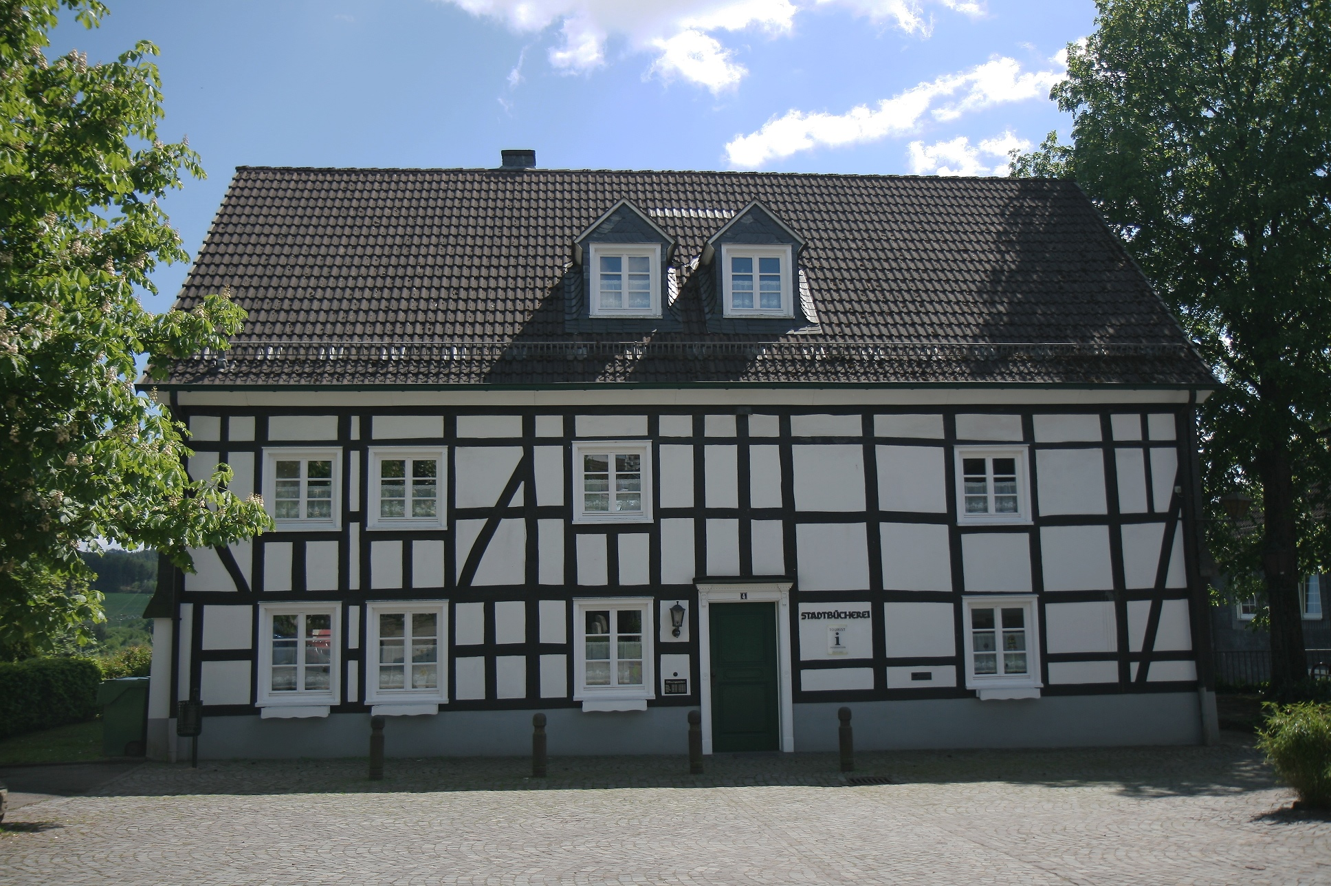 Stadtbücherei, Kirchstraße 4 in Bergneustadt. Zweigeschossiges Fachwerkhaus aus dem 19. Jahrhundert. Durch Umbaumaßnahmen in den Jahren 1980 bis 1982 ging die Denkmaleigenschaft verloren.